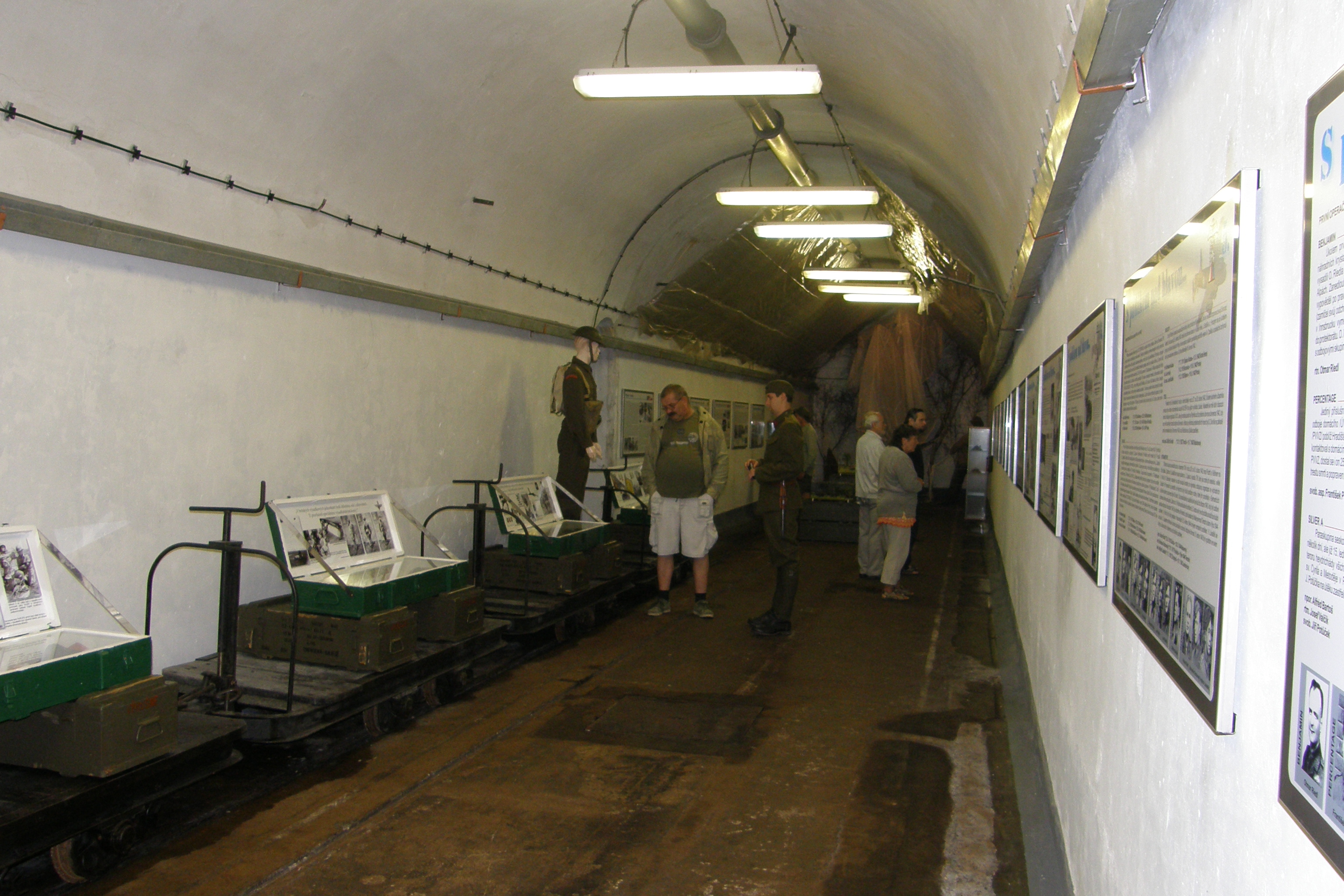 Výstava S padákem nad hlavou v podzemí tvrze Hůrka